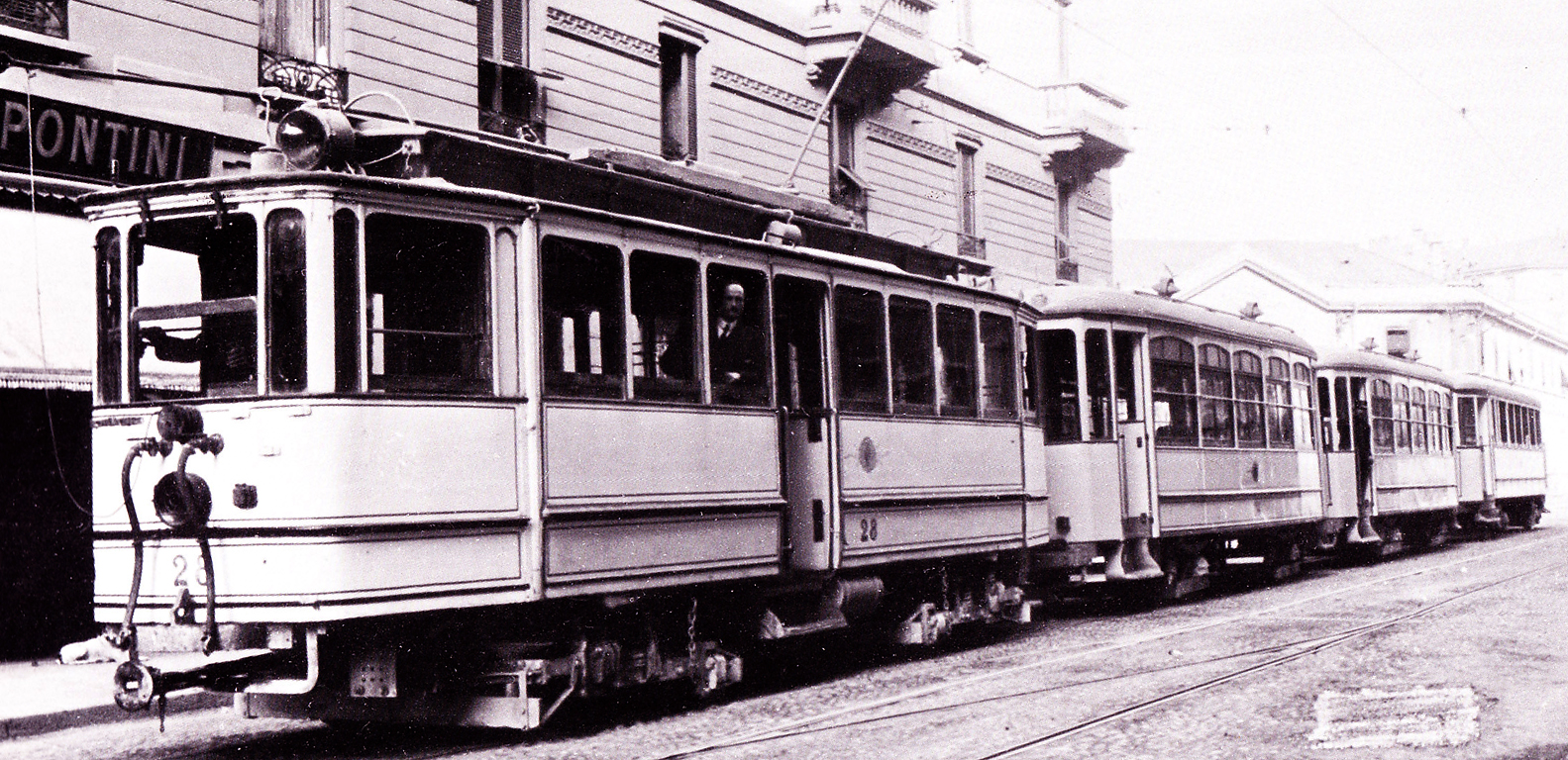 Treno della tranvia Milano-Monza, fotografato all'uscita del deposito Spontini di Milano. In testa la vettura 28 della STEL, appartenente alla serie 20 ÷ 29